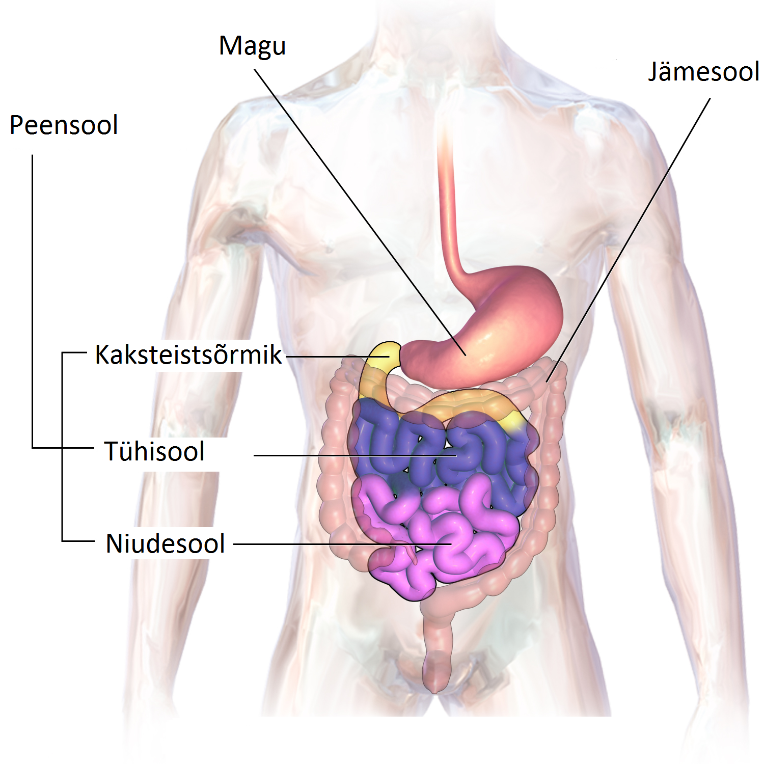 Peensool